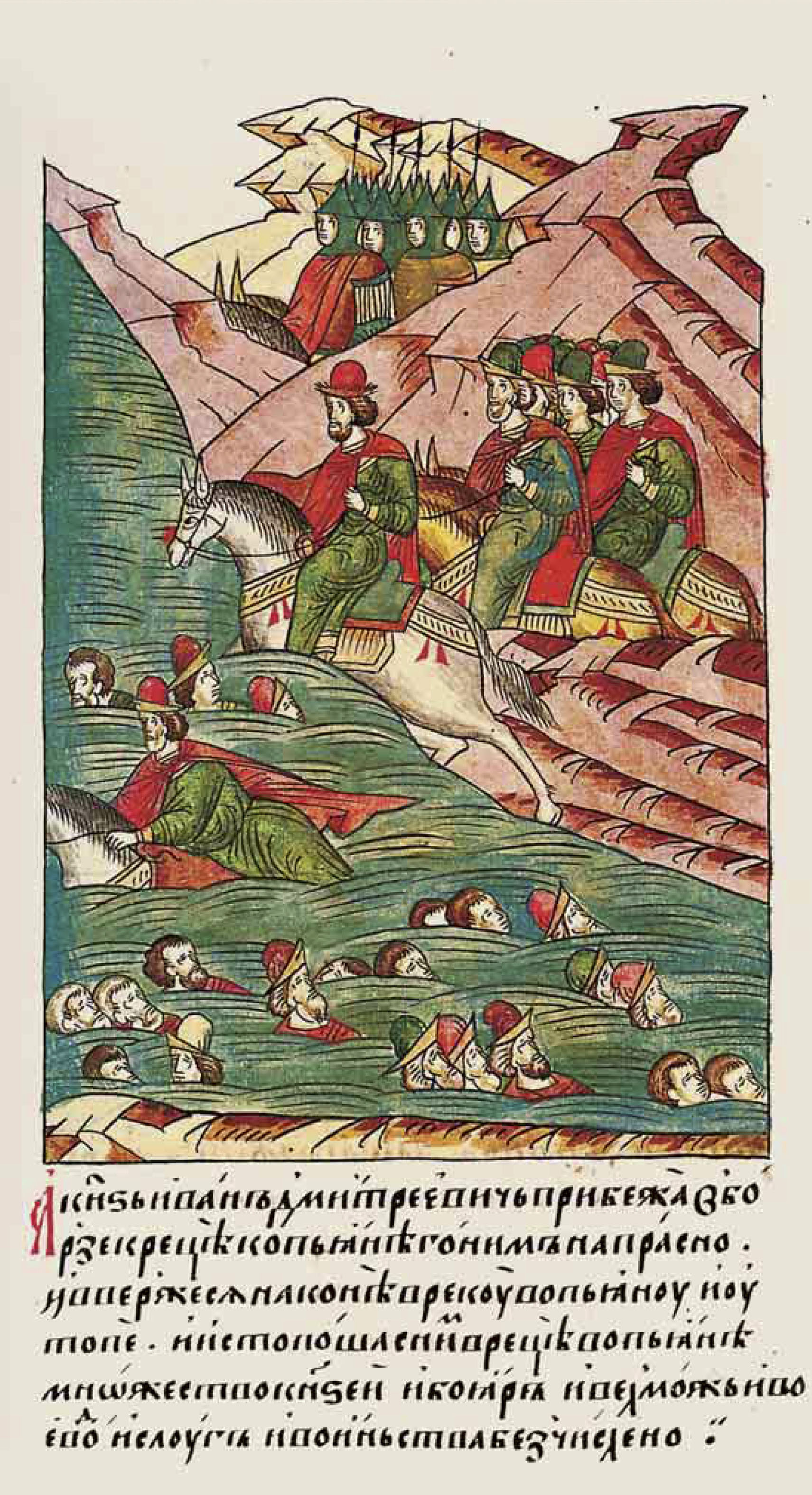 ЛИЦЕВОЙ ЛЕТОПИСНЫЙ СВОД А князь Иван Дмитриевич быстро устремился к реке Пьяне, преследуемый врагами, влетел на коне в Пьяну и утонул, вместе с ним в Пьяне утонуло много князей, бояр, вельмож, воевод и слуг, множество воинов.